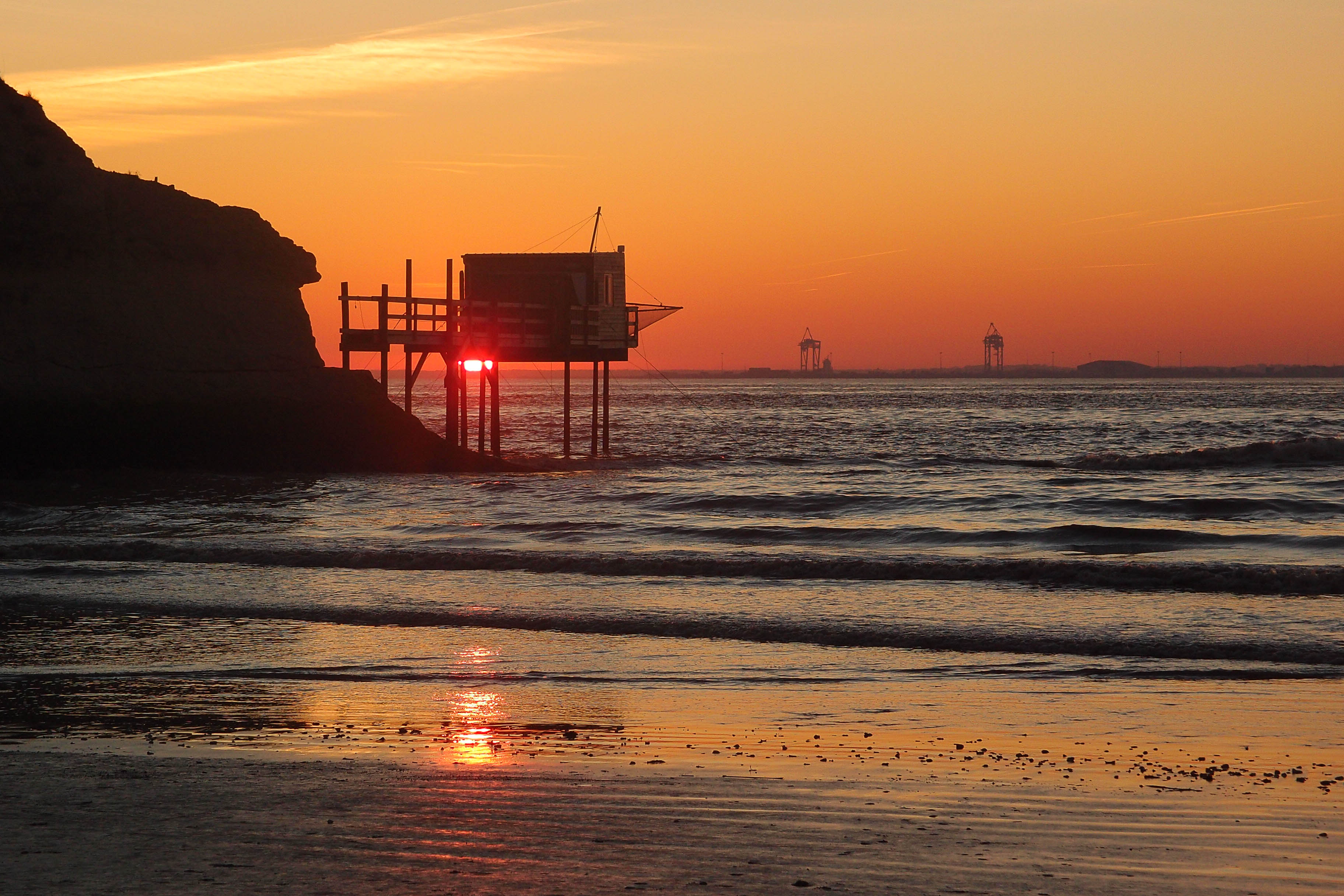 Le soleil se couche derrière un carrelet à Meschers sur Gironde. De l'autre côté de l'estuaire, la pointe du Verdon et les grues de son port.